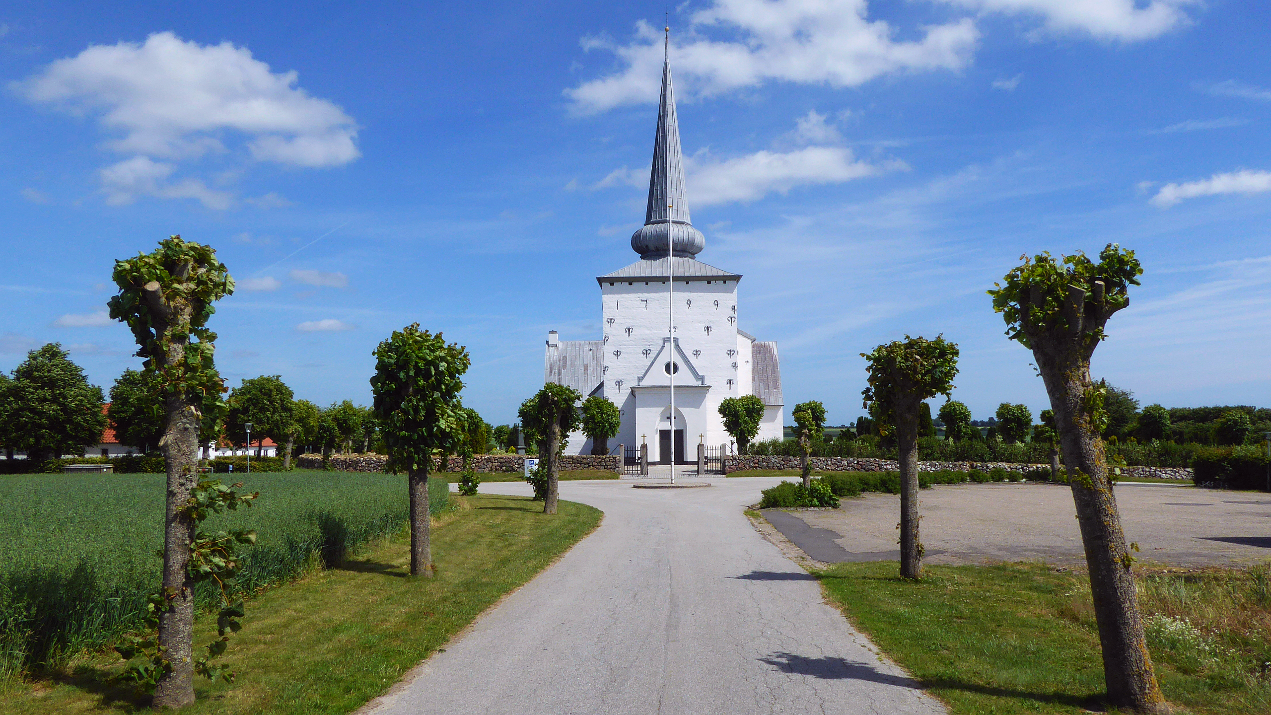 Vilstrup Kirke, zurückgehend auf das 15. Jahrhundert. Sønderjylland, Syddanmark. Vilstrup Sogn. Dänemark. Foto 2018 Wolfgang Pehlemann P1210664